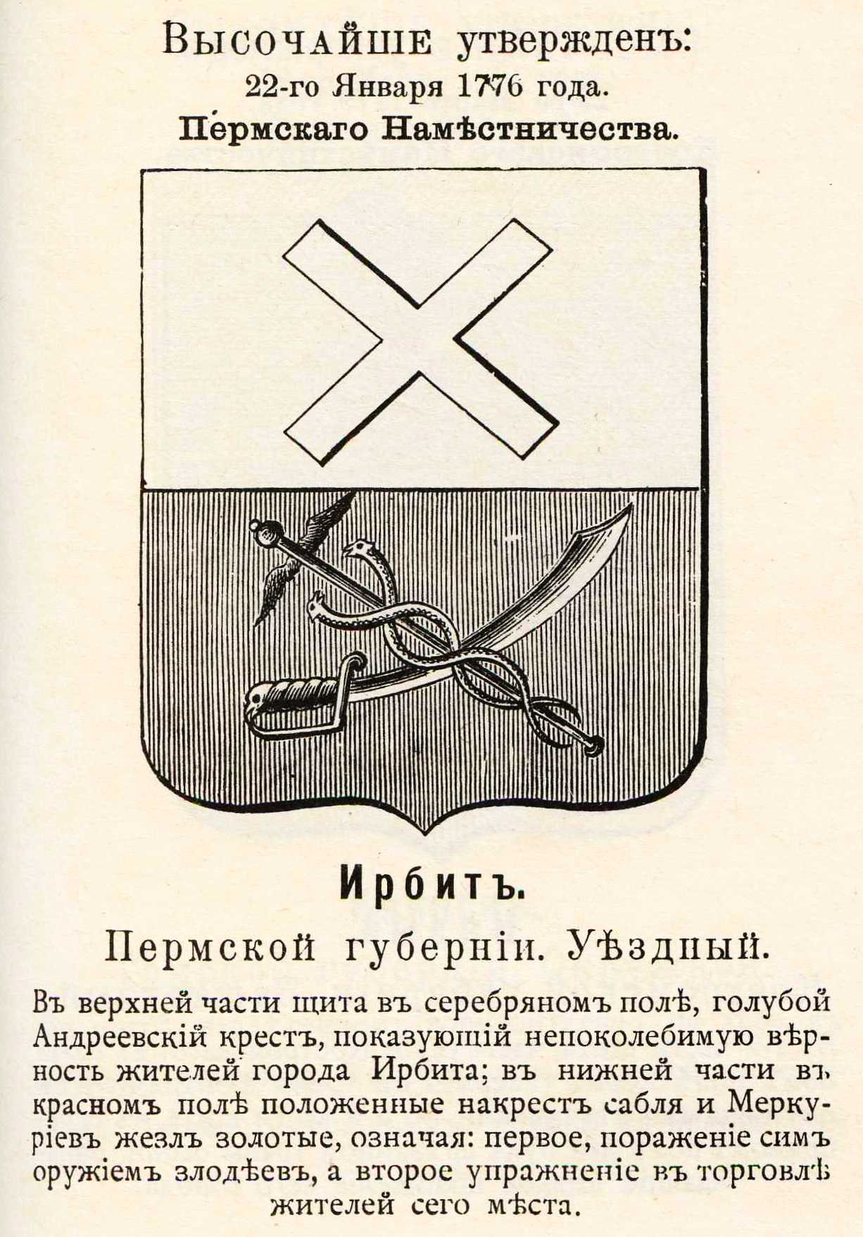 Official Russian Empire Irbit coat of arms. Герб уездного города Ирбит Пермской губернии Российской Империи с официальным описанием в Гербовнике Павла Петровича Винклера.